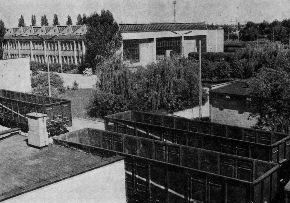 Teren Centralnego Ośrodka Badań i Rozwoju Techniki Kolejnictwa mieszczący się na warszawskim Grochowie na ul. Józefa Chłopickiego 50. COBiRTK przeniósł swoją siedzibę na Grochów w 1959, natomiast zdjęcie opublikowano w książce z 1974. Fotografia pochodzi zatem z okresu pomiędzy tymi datami.